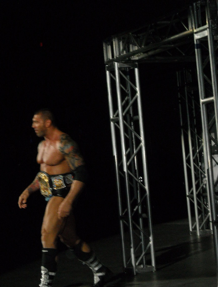 Road To Wrestlemania 2010